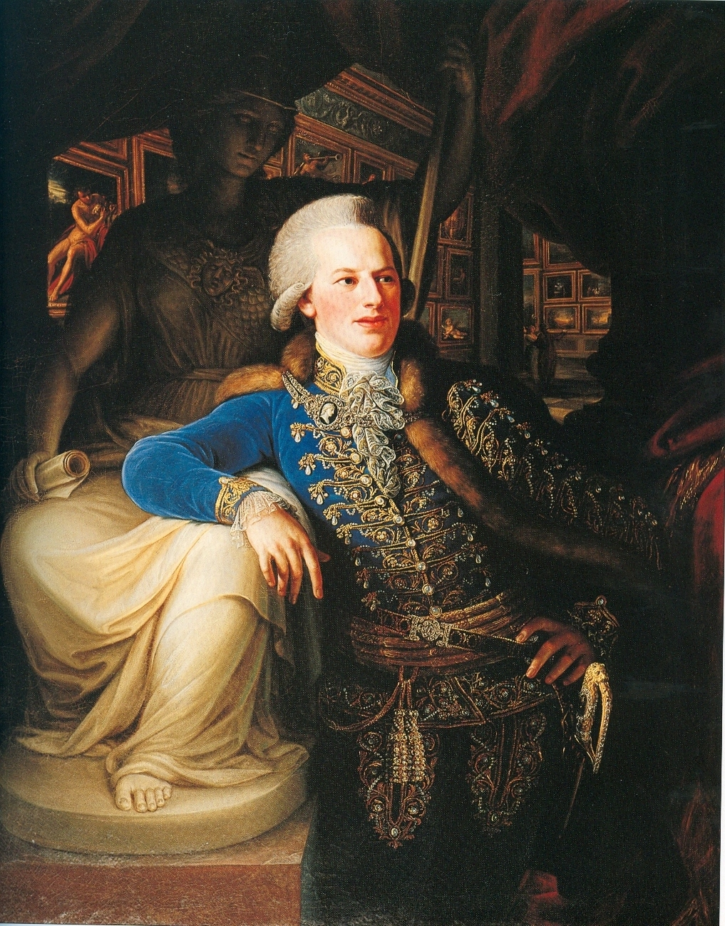 Portrait of Ferencz József Koháry de Csábrág (1760/6-1826)label QS:Len,"Portrait of Ferencz József Koháry de Csábrág (1760/6-1826)" label QS:Lhu,"Koháry I. Ferenc József herceg (Bécs, 1767. szeptember 4. – Oroszvár, 1826. június 27.)"